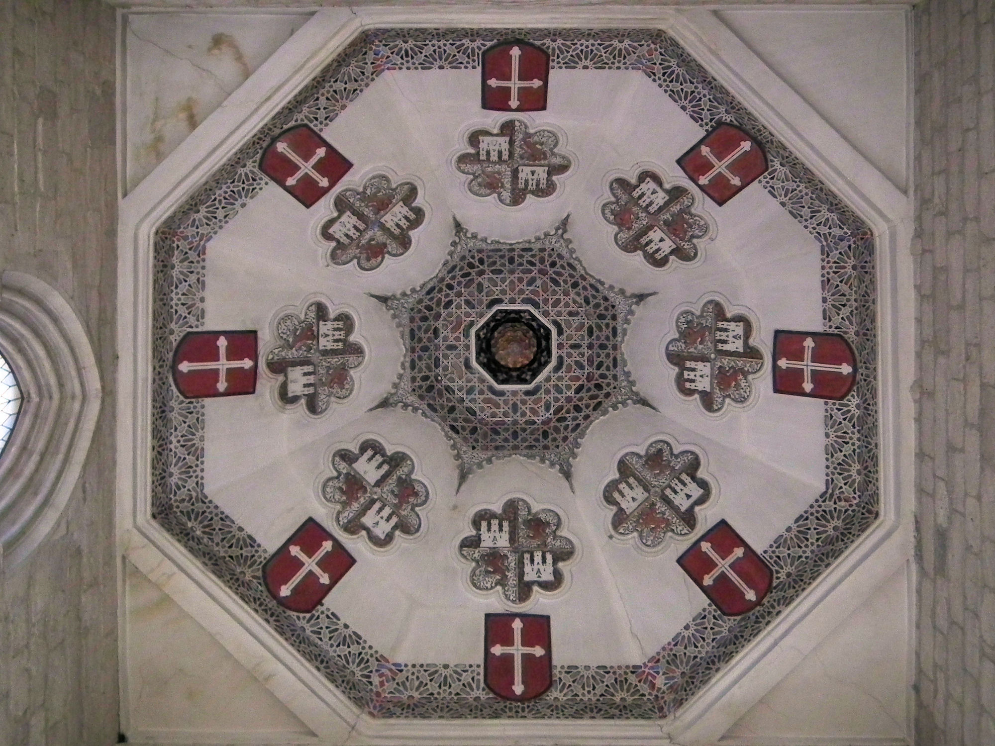 Vault inside Museo Diocesano y Catedralicio, Valladolid, Castile and León, Spain